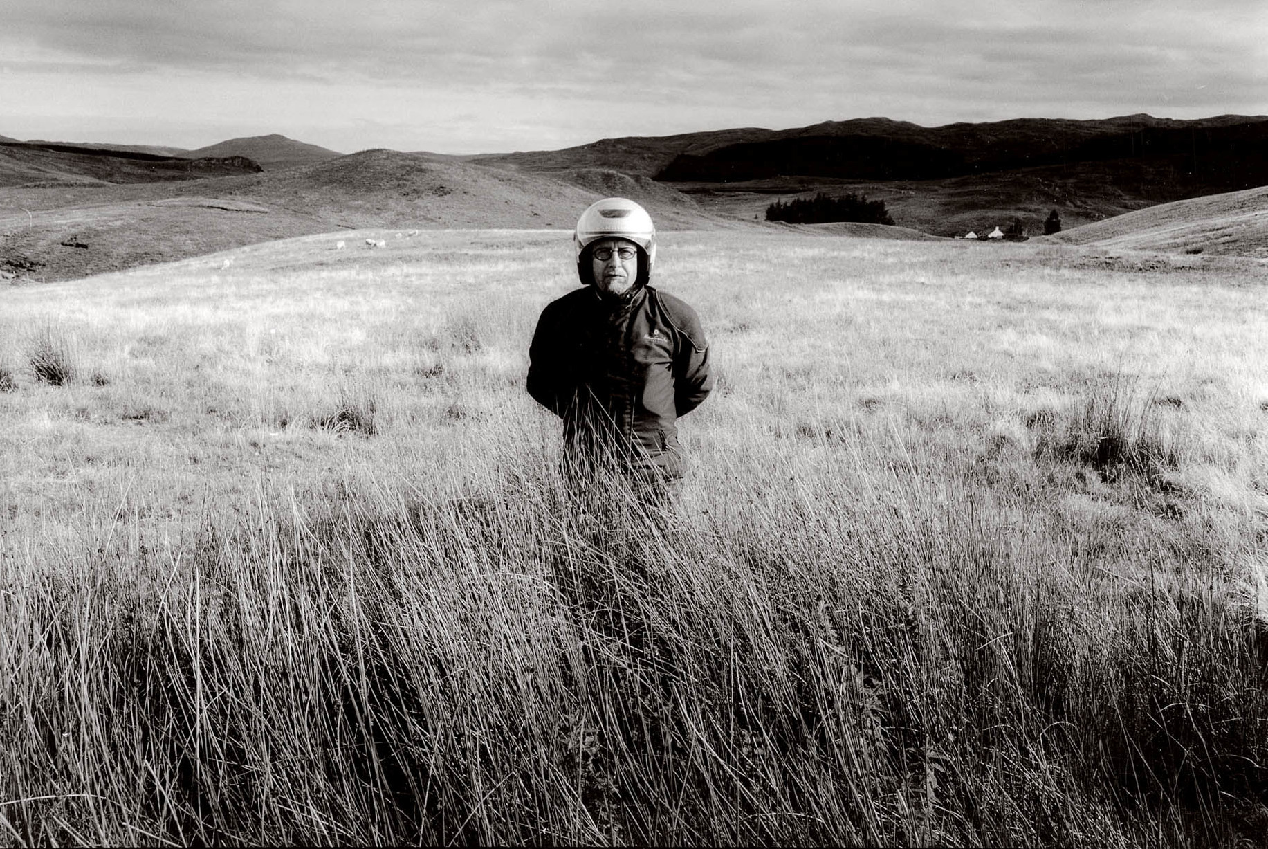 Jean Blaute in Snowdonia (Wales) tijdens de opnames van het Canvas-programma 'De Bende van Wim'.